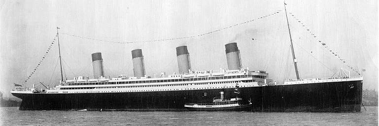 Olympic from the side